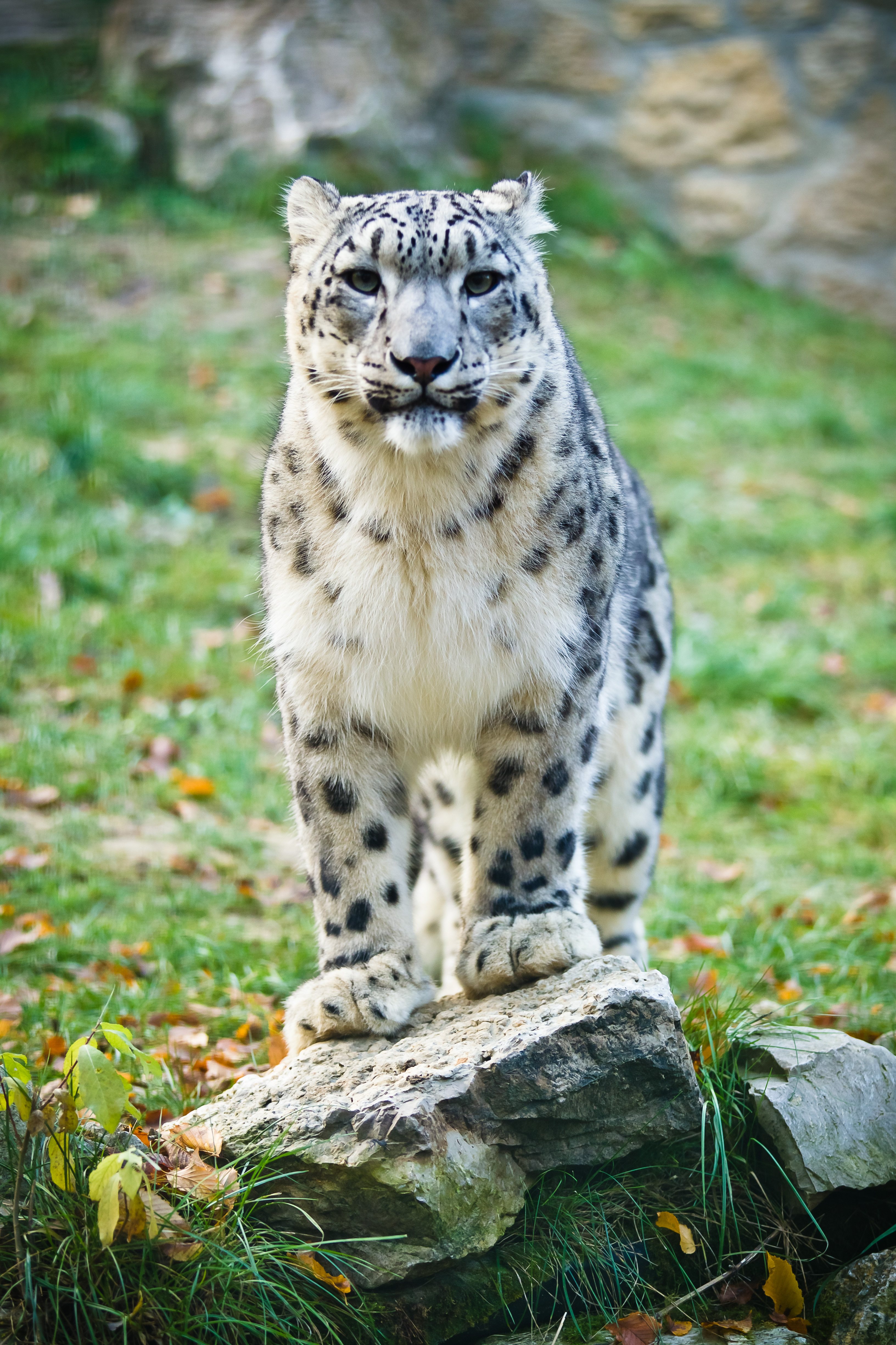 Hópárduc a veszprémi állatkertben